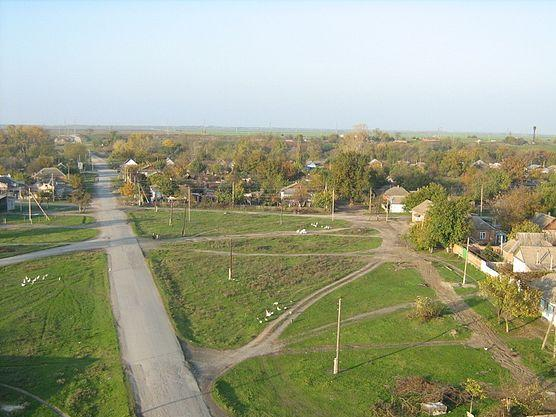 Пятая сотня (село Троицкое, Северная Осетия)